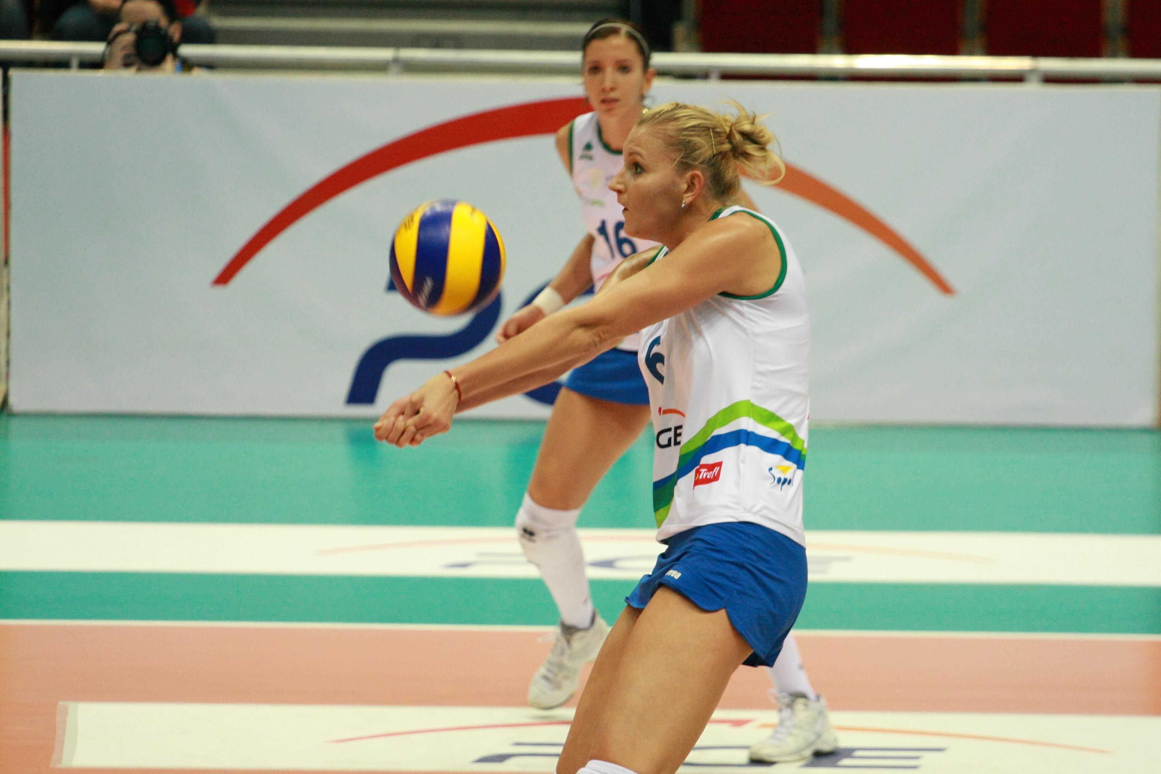 Anna Podolec